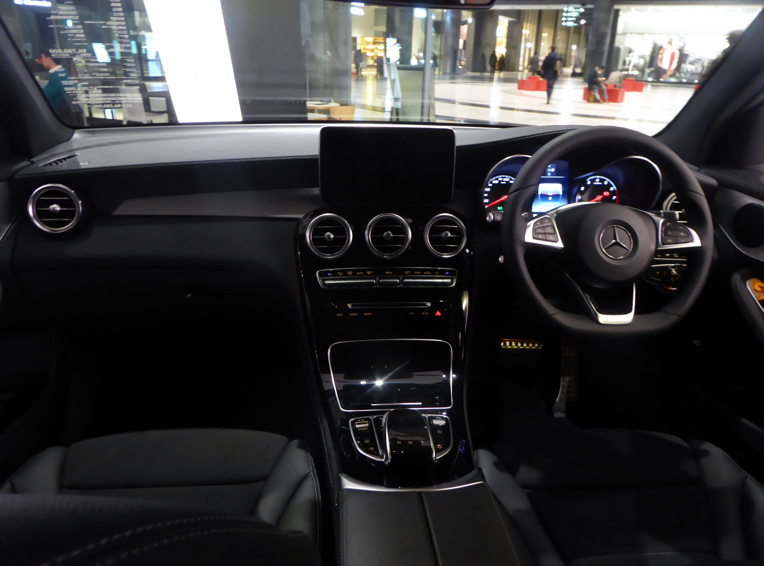 X253型メルセデス・ベンツ・GLC250 4MATICスポーツのインテリアを撮影。